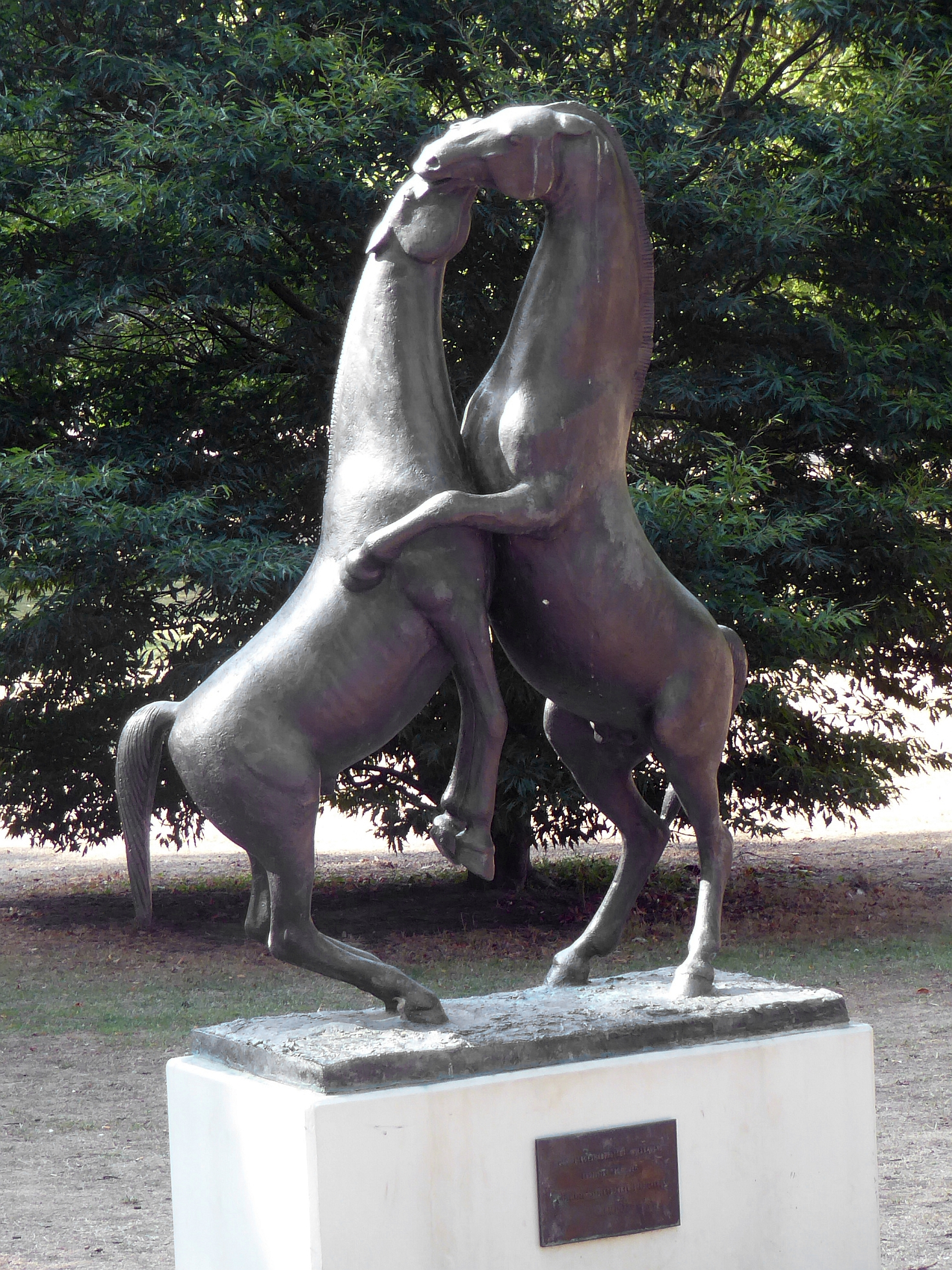 Gerhard Marcks (1889–1981) «Spielende Hengste» 1962, Bronze. Wiesbaden, Park am warmen Damm. 50°04'59.2"N 8°14'49.2"E, 50.083098, 8.246997